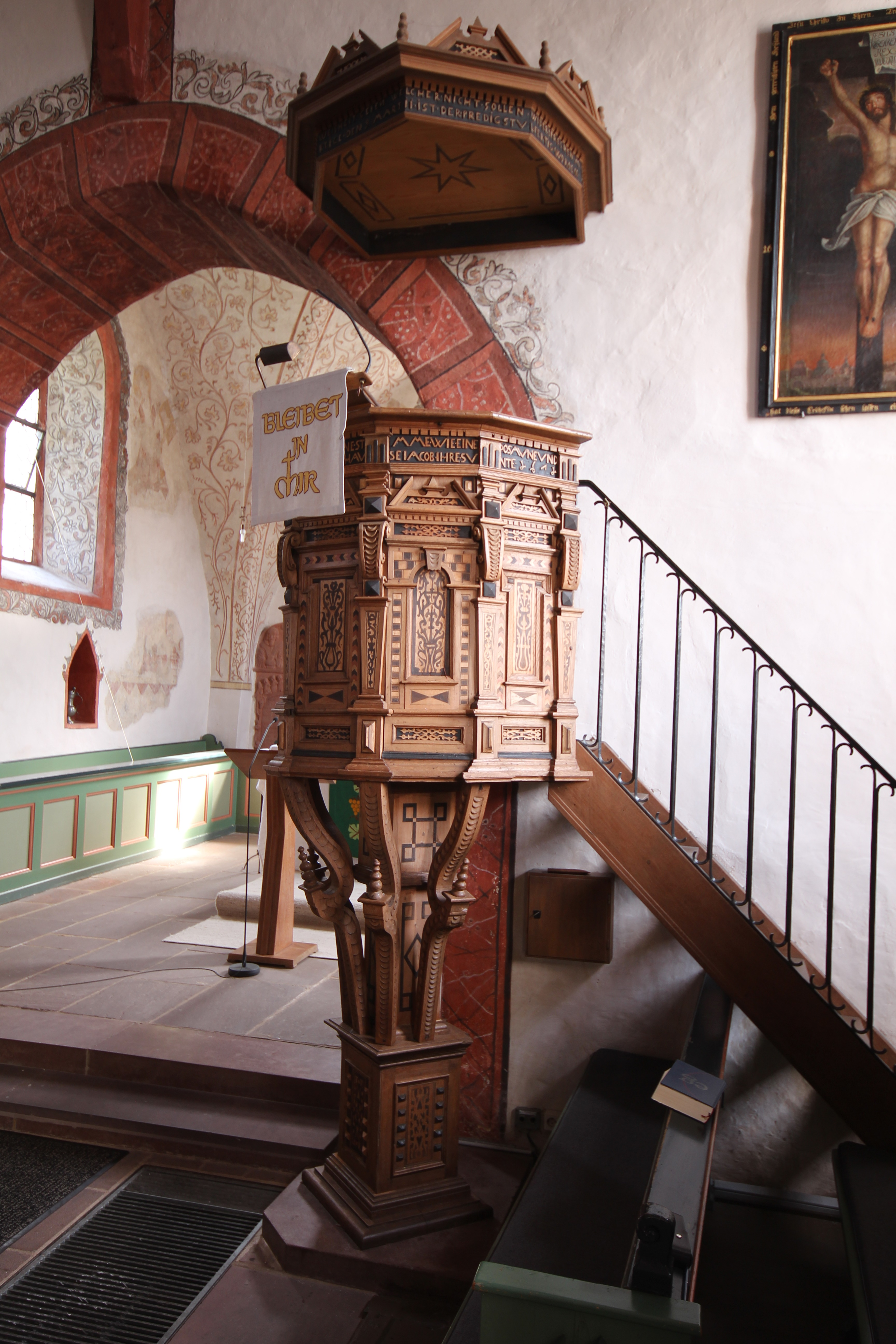 Kanzel der Evangelischen Kirche zu Hohenahr-Erda